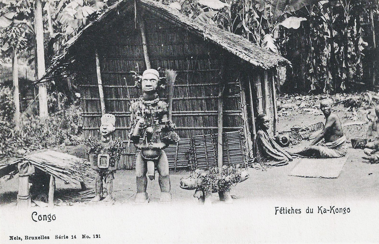 Fétiches du Ka-Kongo. Nels, Bruxelles, série 14, n° 121 Congo